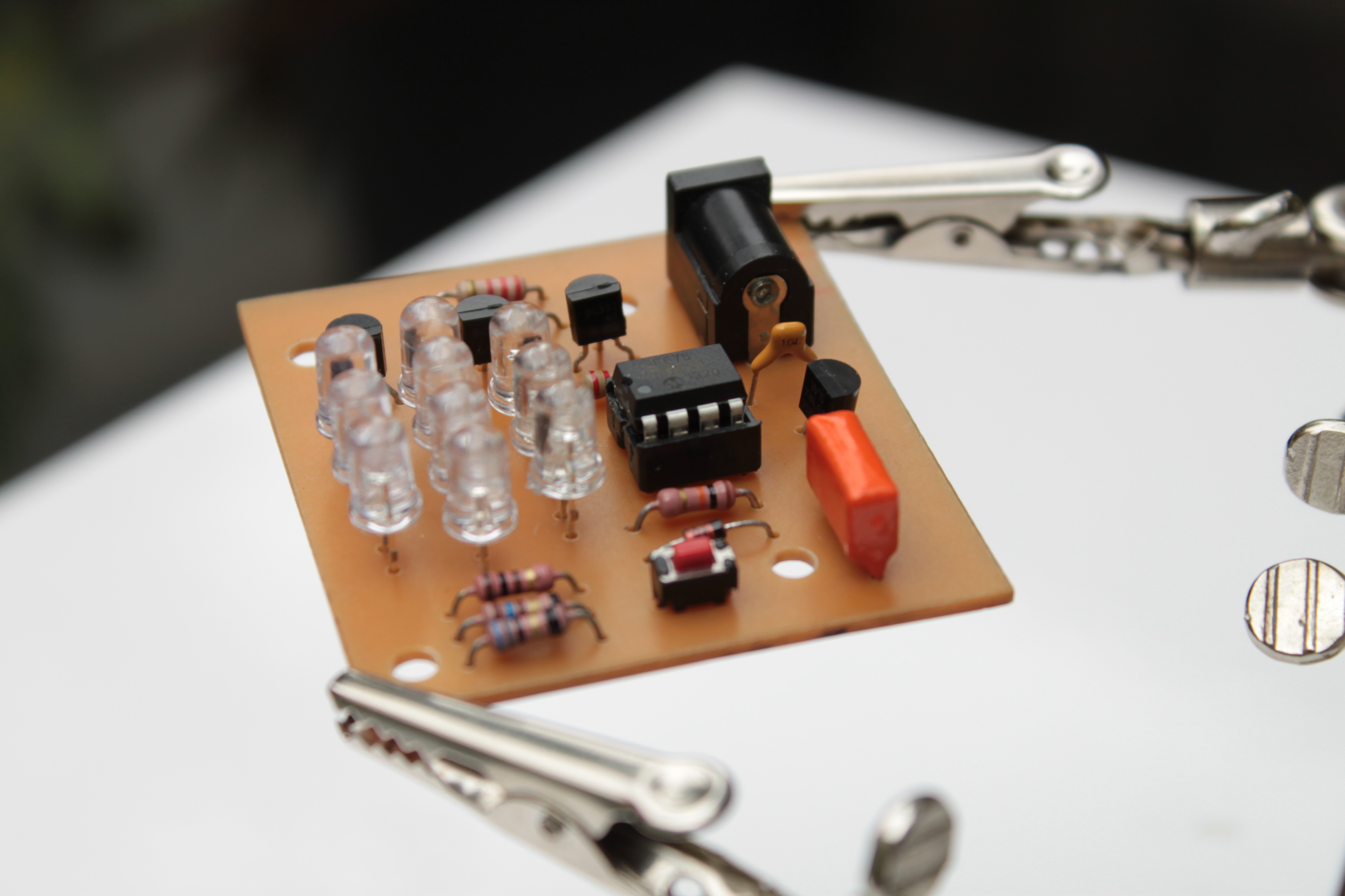 circuito eletrônico com microcontrolador e diodos LED de alto bbrilho